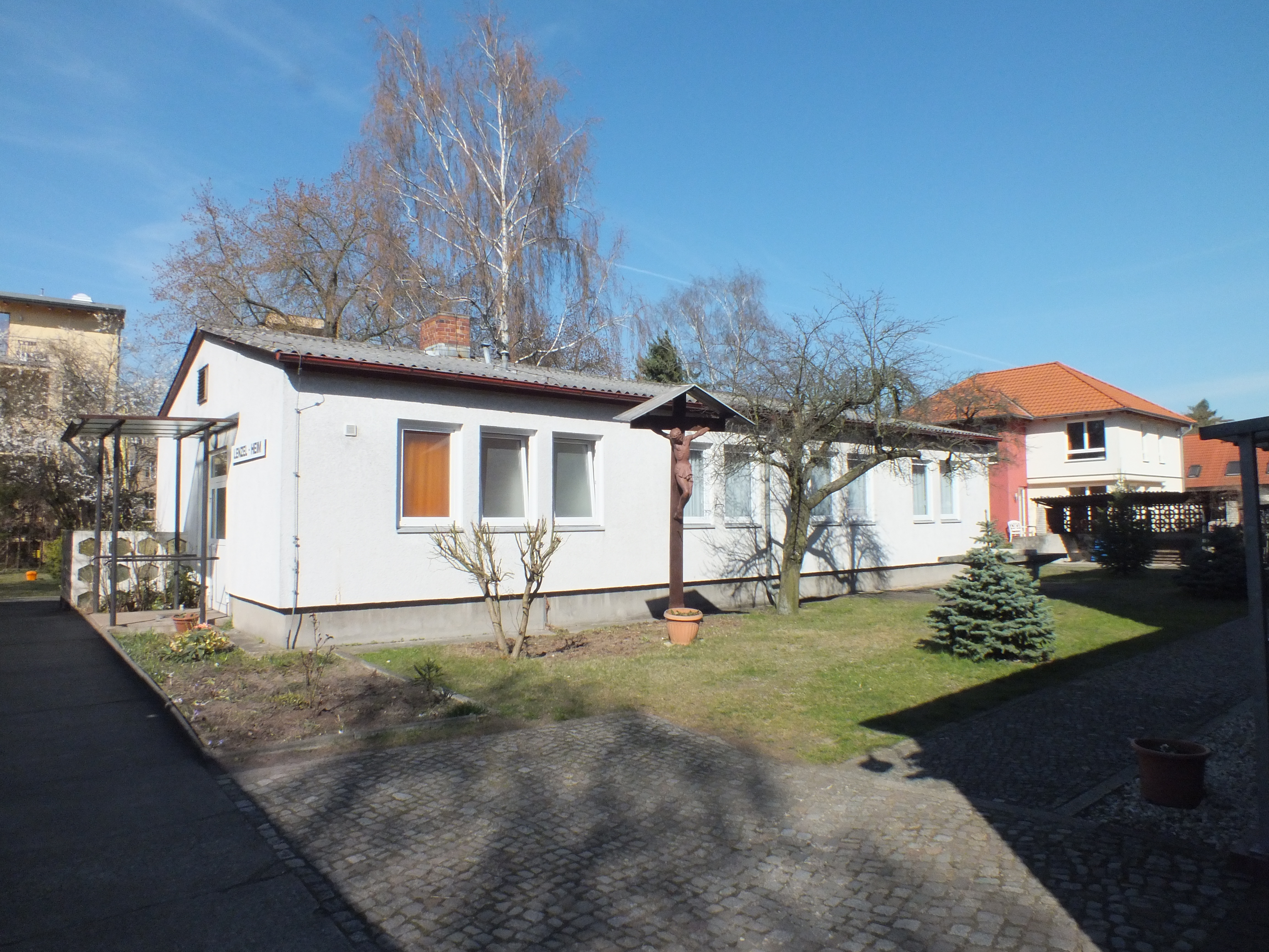 Kirche Maria Magdalena, Berlin-Niederschönhausen: Lenzel-Heim hinter der Kirche